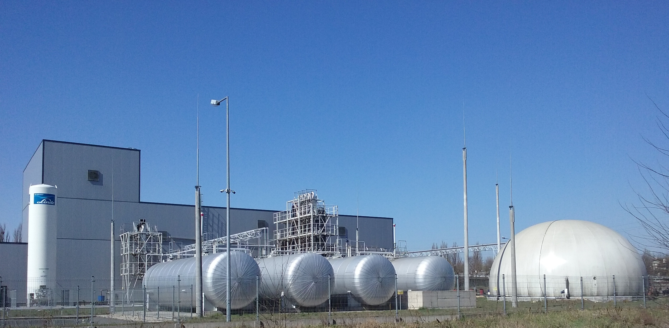 Tomaszów Mazowiecki w województwie łódzkim, PL, EU. EcoHydroCarbon (przetwarzanie odpadów polimerowych) na terenie dawnego Wistomu, CCO